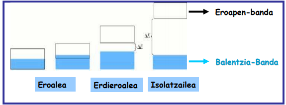 Eroale, erdieroalea eta isoltzailearen eropaen eta balentzia banda